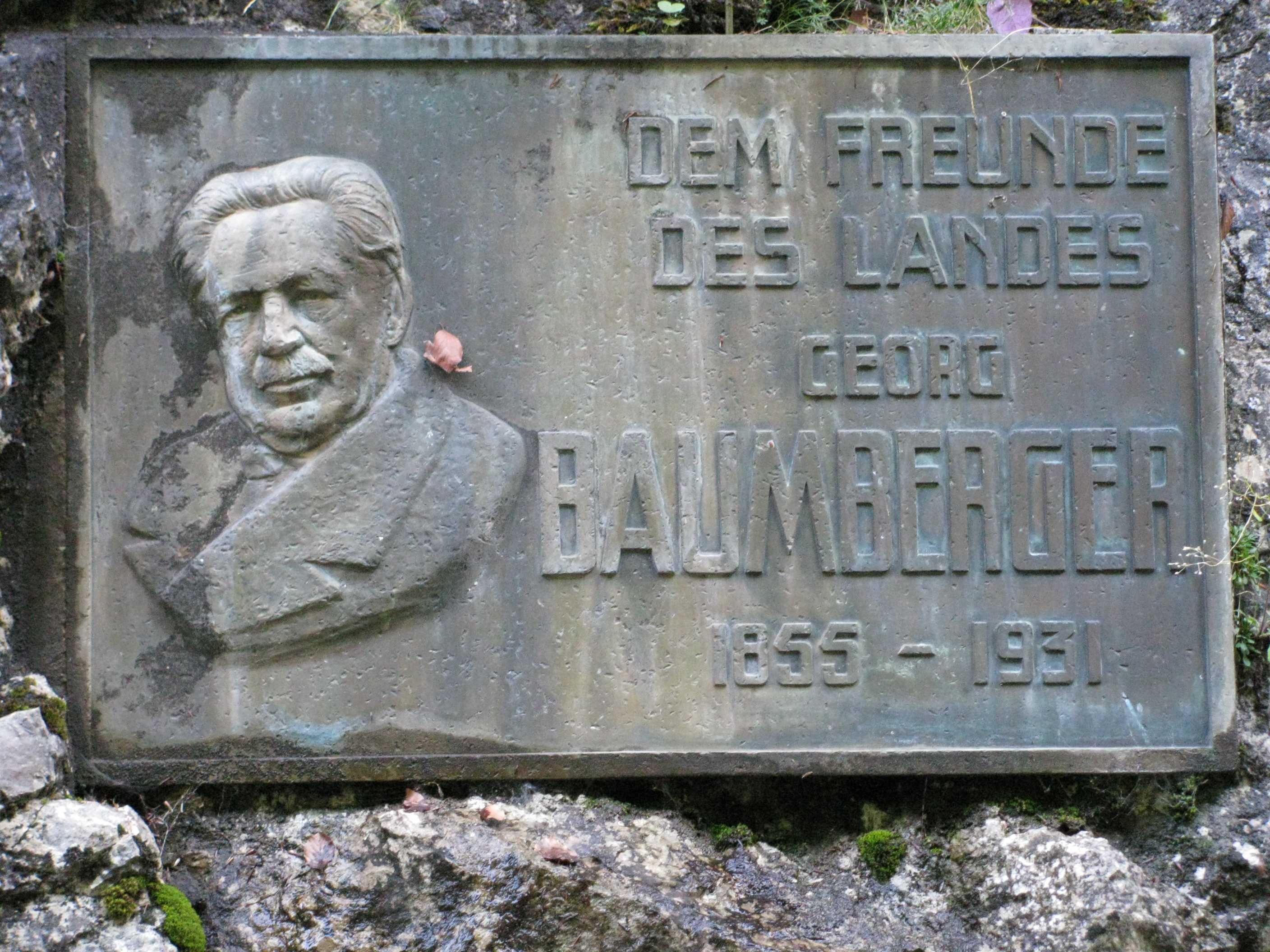 Schweiz - Kanton Appenzell-Innerrhoden - Rüte - Brülisau: Gedenktafel für "Dem Freunde des Landes Georg Baumberger 1855-1931" an der Fahrstraße zum Gasthaus "Plattenbödeli"